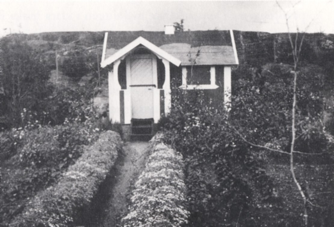 Äldre kolonistuga på Södra Tantolunden (numera riven)